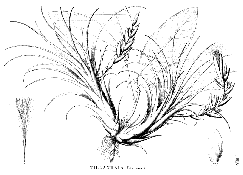 Martius, Fl. Br. : tab. 109 (1894)